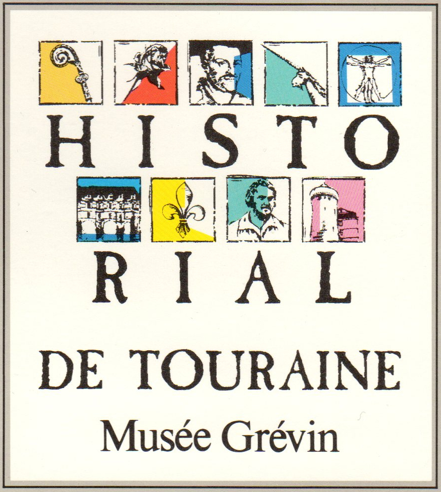 Elément de couverture du catalogue de l'ancien Musée Historial de Touraine au château de Tours